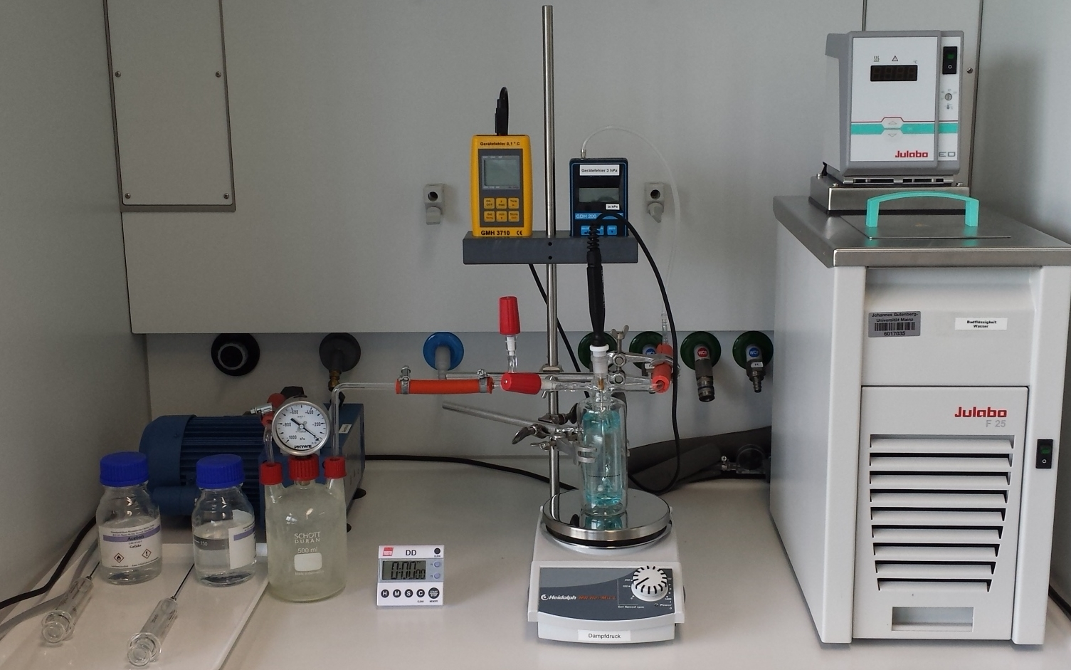 Versuchsaufbau zur Messung des Dampfdrucks.